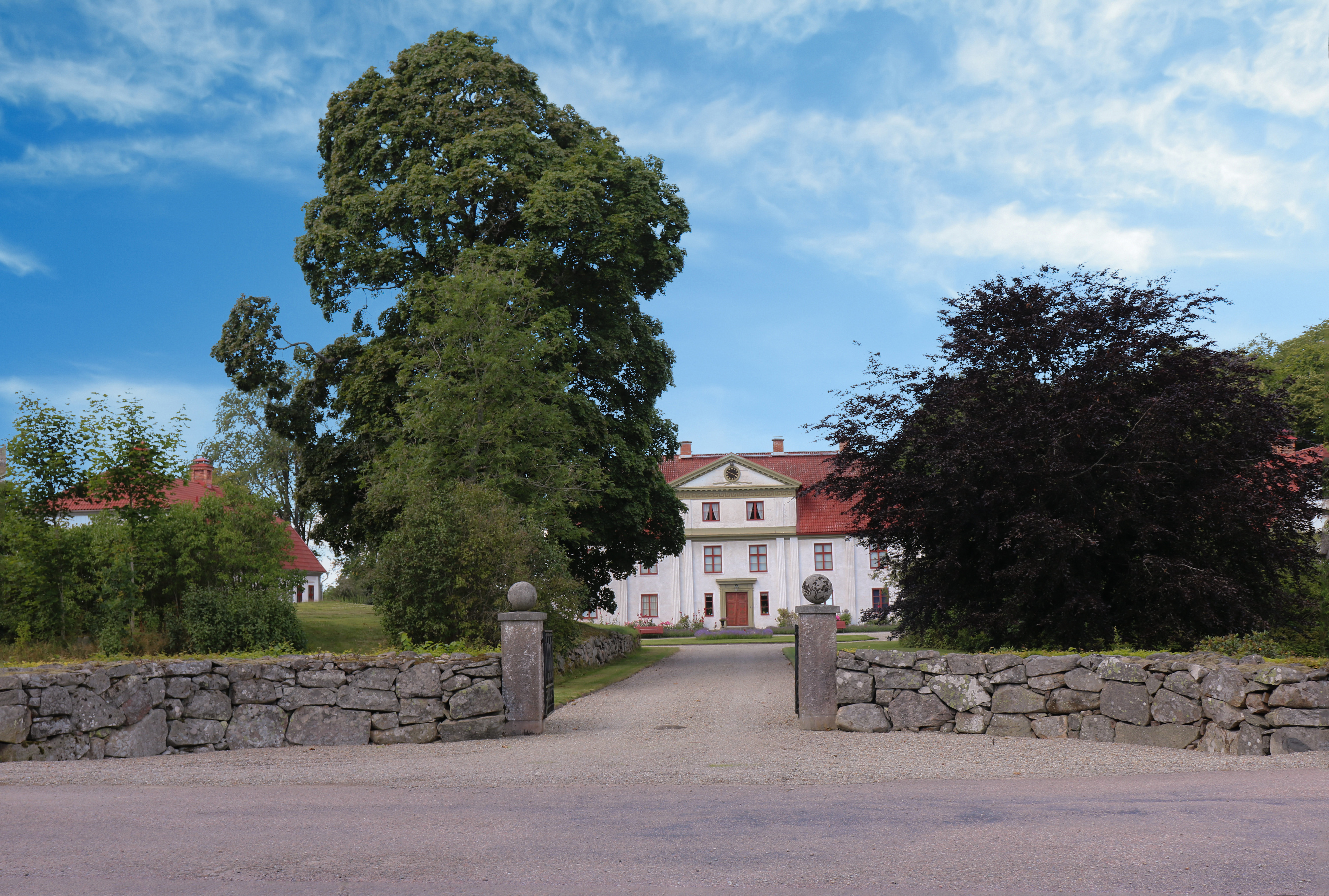 Lidhems säteri,Väckelsång,Tingsryds kommun. Herrgårdsbyggnaden.